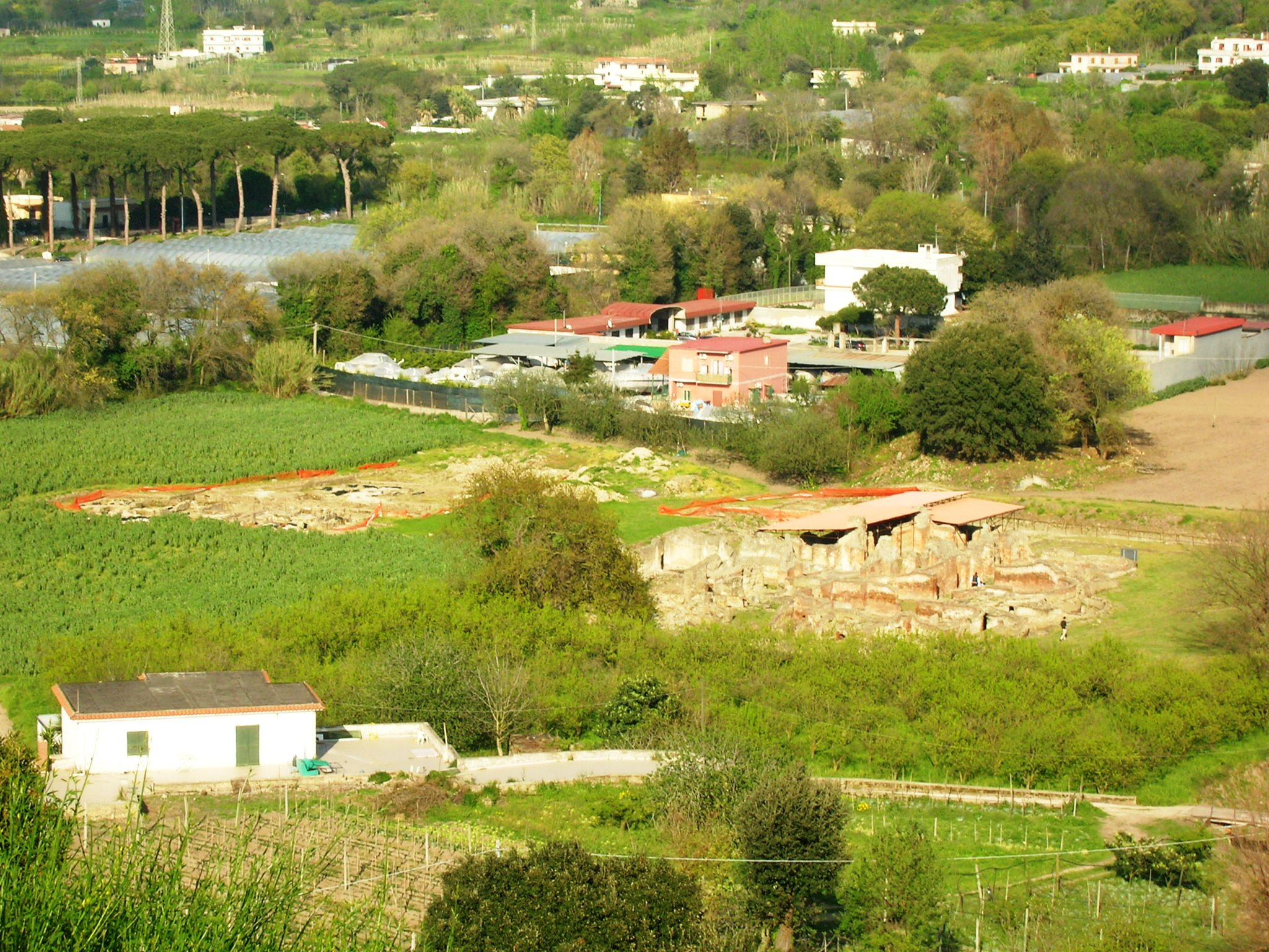 Altri scavi cumani